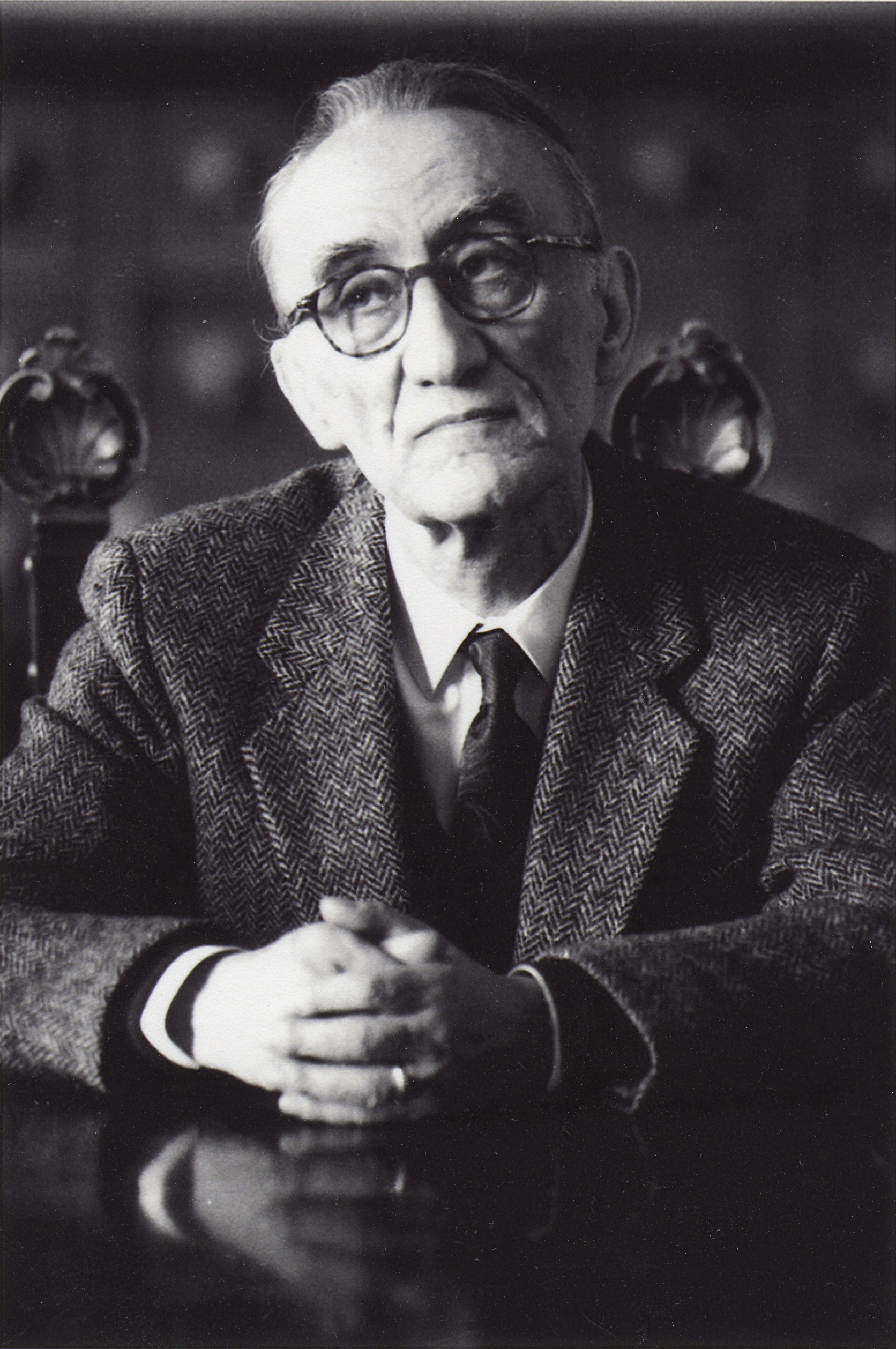 Francesco Mazzoni all'Accademia della Crusca